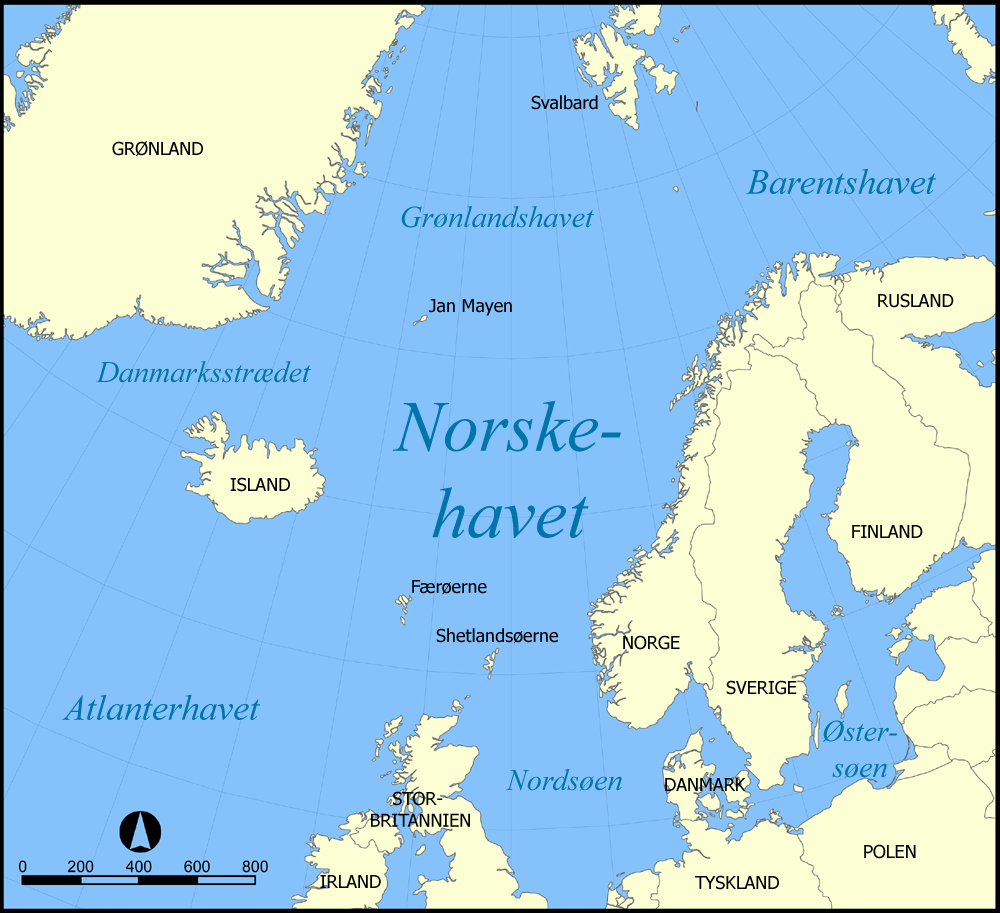 Dansk version af Image:Norwegian_Sea_map.png, lavet udfra Image:Norwegian_Sea_blank_map.pngEnglish:Danish version of Image:Norwegian_Sea_map.png, derived from Image:Norwegian_Sea_blank_map.png